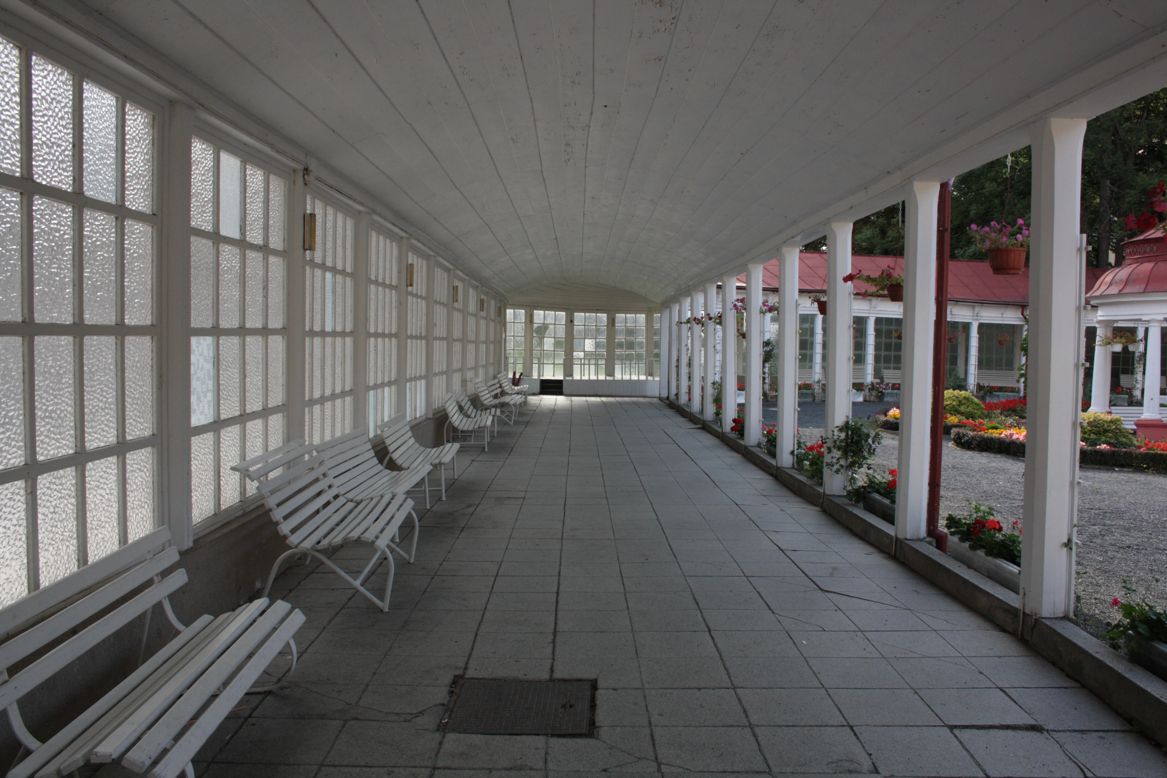 Krytá část kolonády v Lázních Libverdě (pohled k západu).